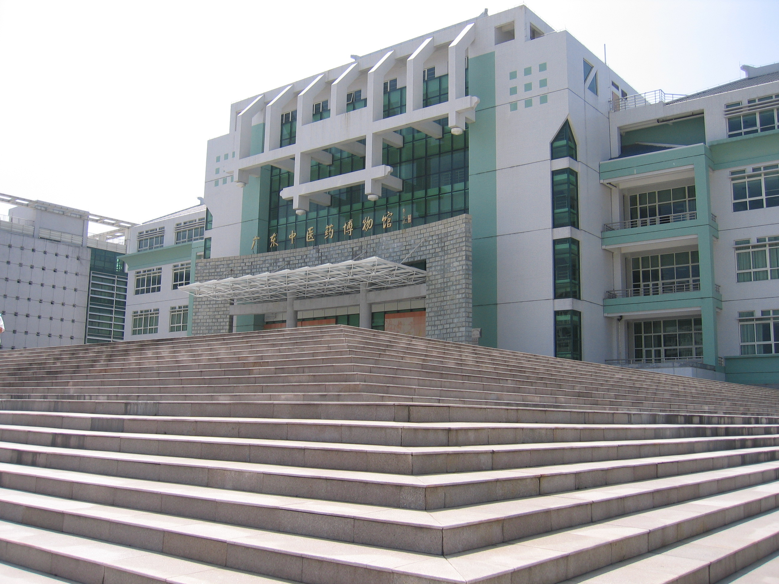 廣東中醫藥博物館